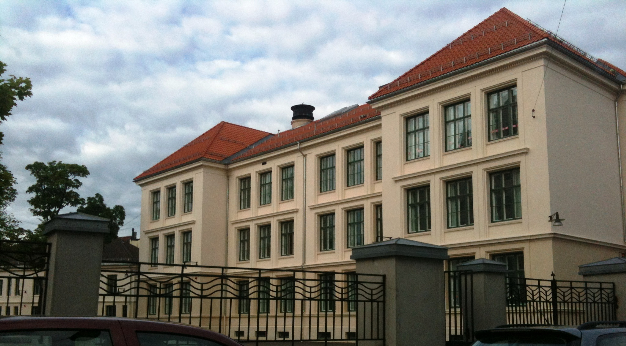 Bjølsen skole på Sagene i Oslo.